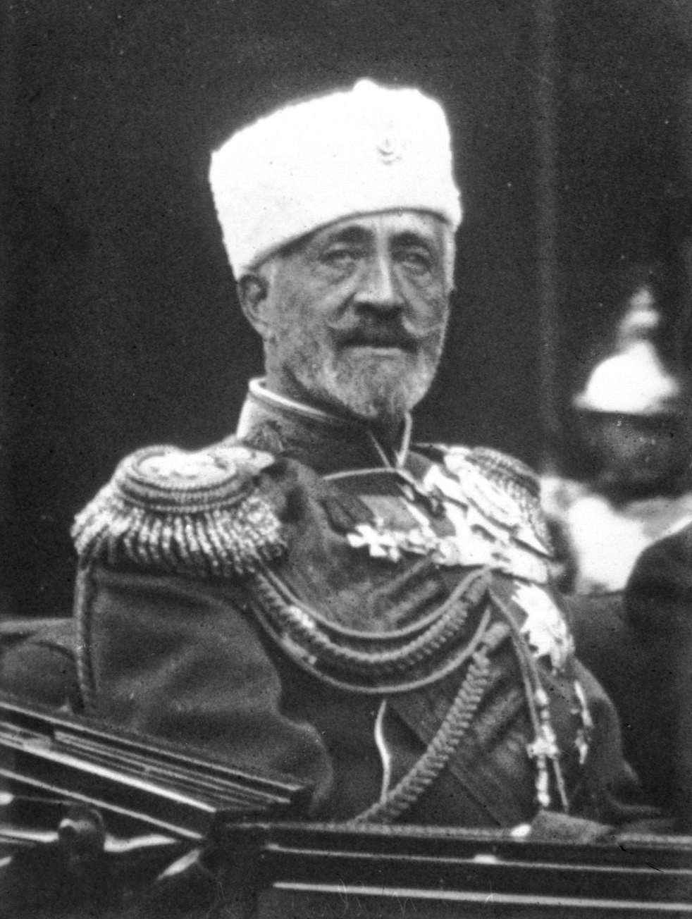 Grand-Duc Nicolaievitch [généralissime des armées russes, prince impérial, portrait] : [photographie de presse] / [Agence Rol]